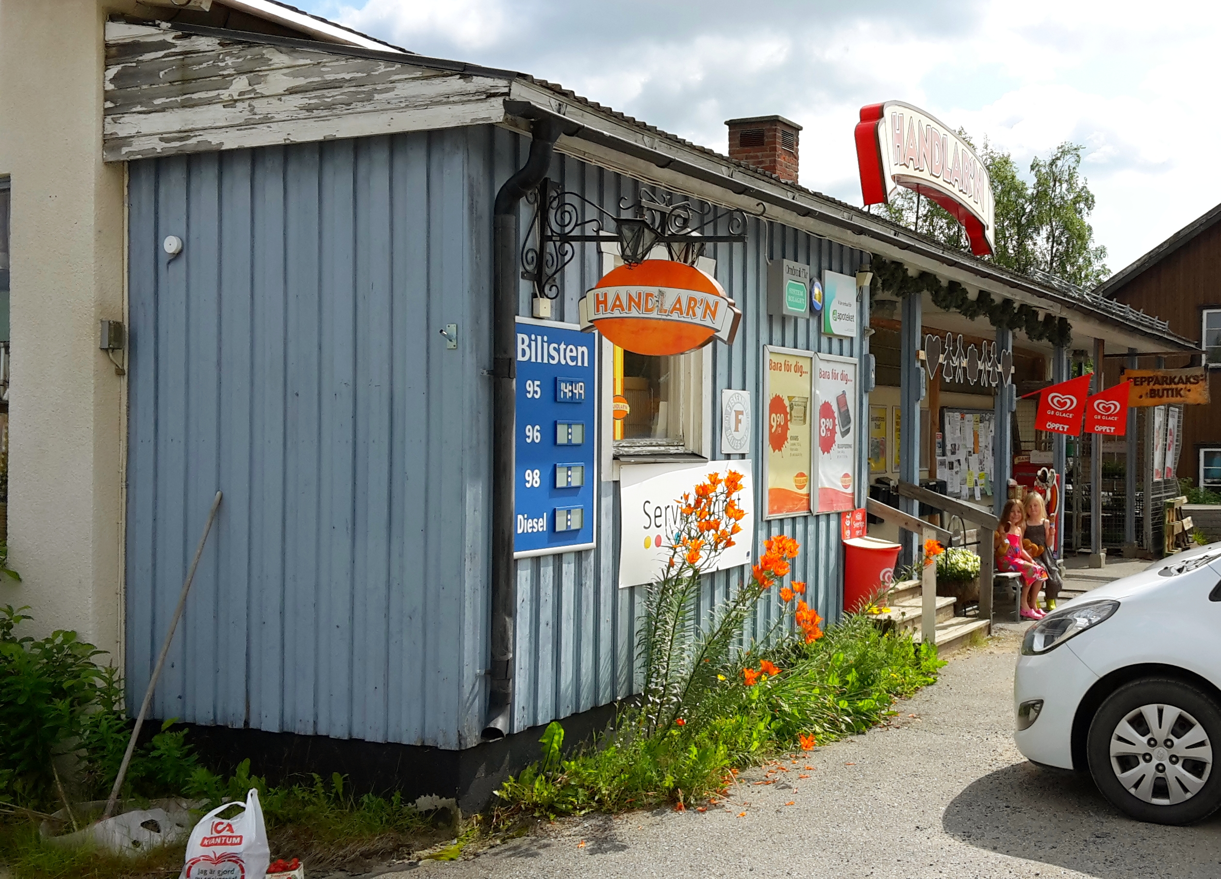 Handlar'n i Nyåker. Träffpunkt och enda affären i området.